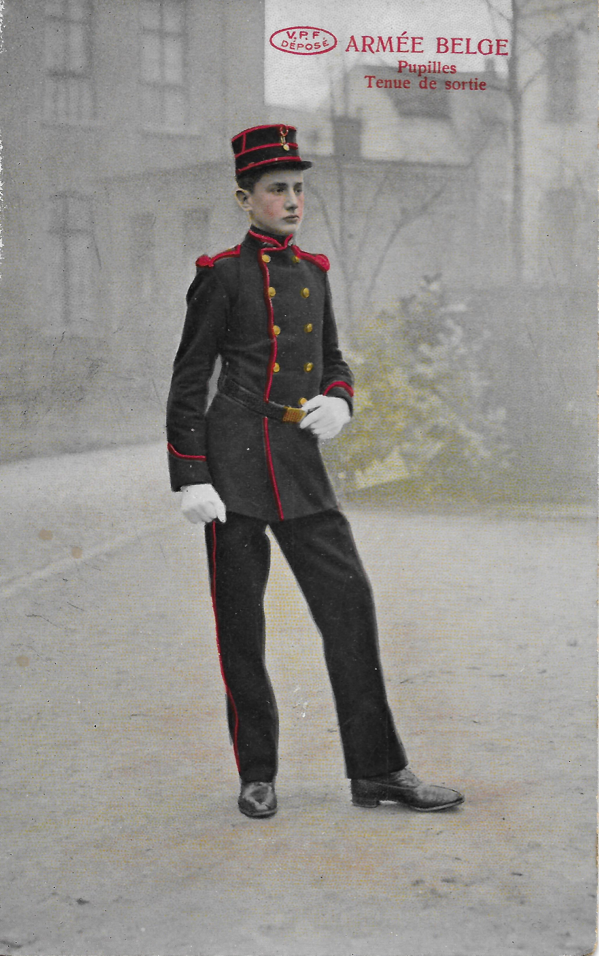 Een bewerkte foto met opschrift “Armée Belge Pupilles Tenue de sortie” van een jongeling in blauw en rood afgebiesde uniform met kepie en witte handschoenen